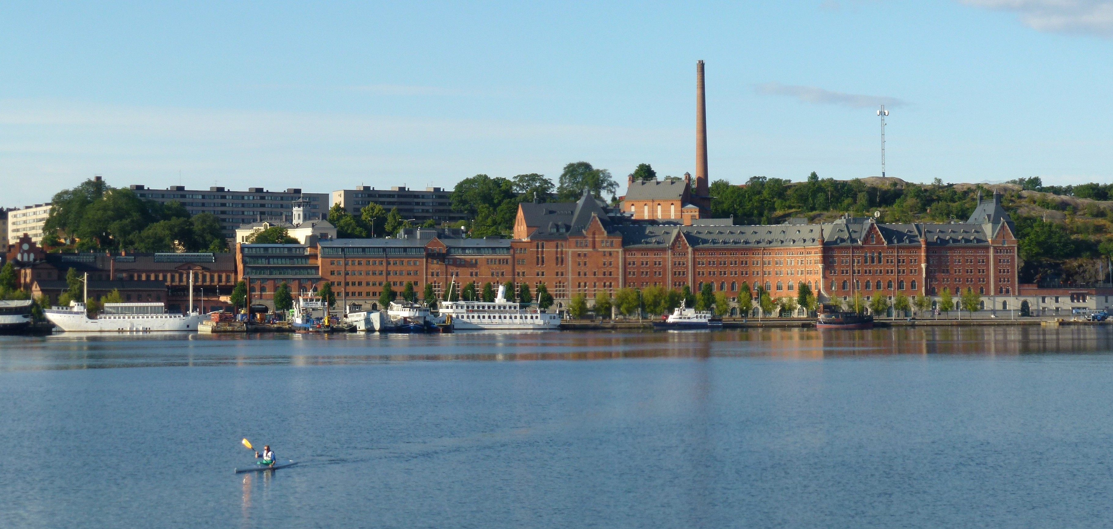 Münchenbryggeriet